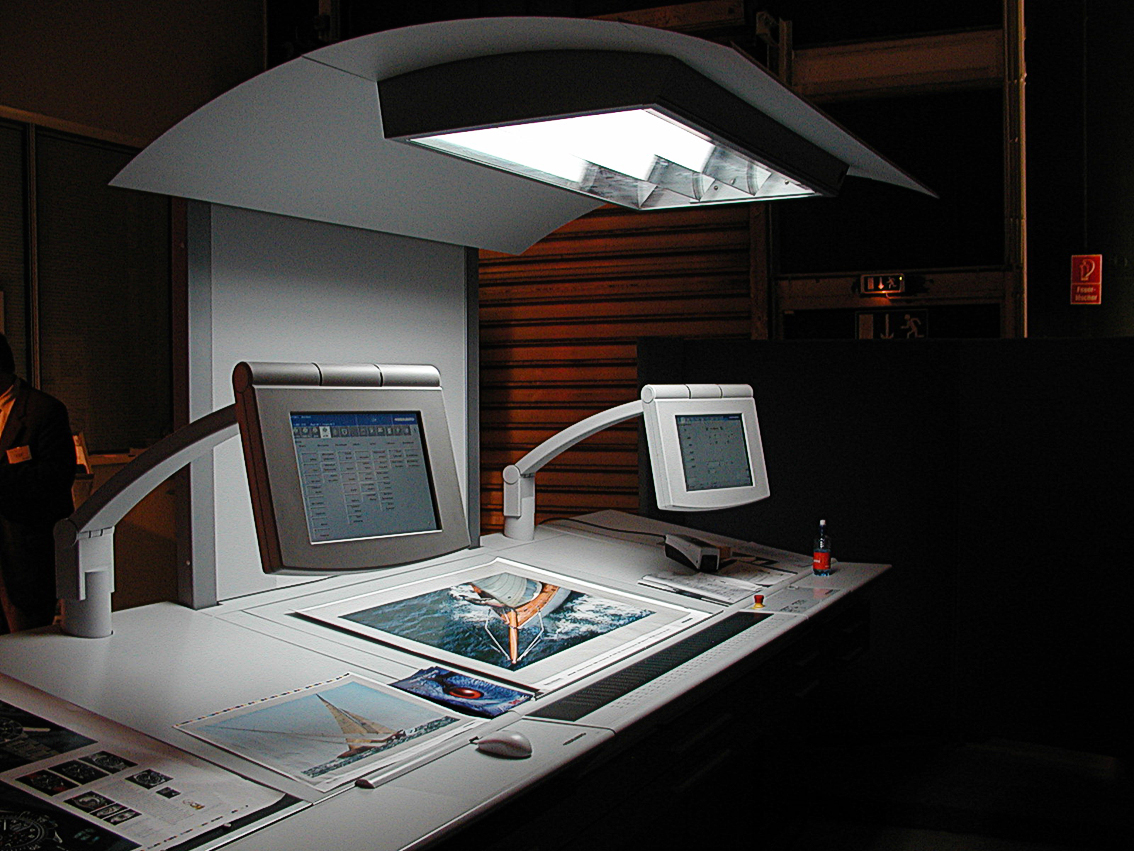 Das Steuerpult der "Speedmaster SM 102" eine Druckmaschine der Firma Heidelberger Druckmaschinen